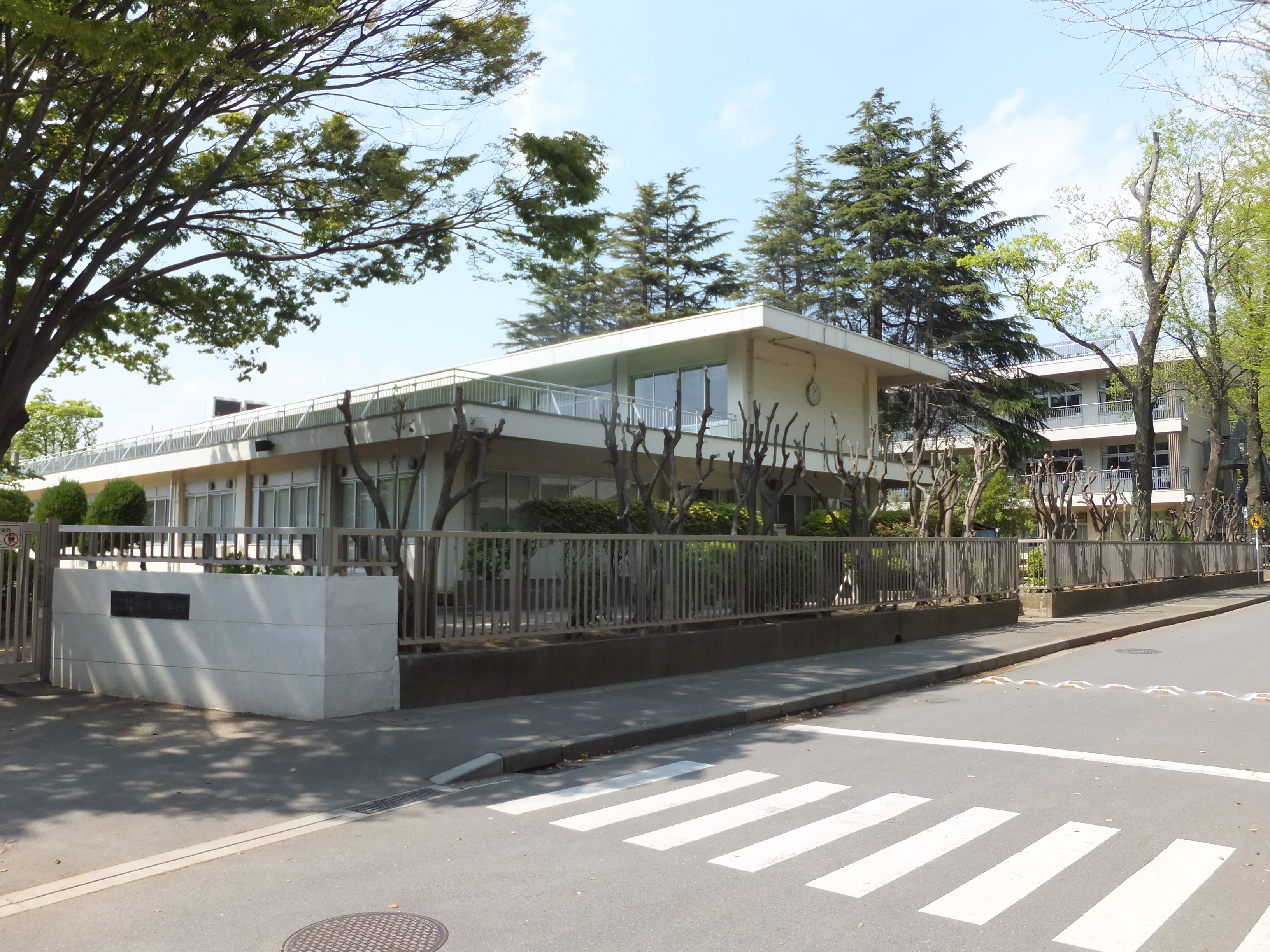 千葉大学教育学部附属小学校（千葉大学西千葉キャンパス）